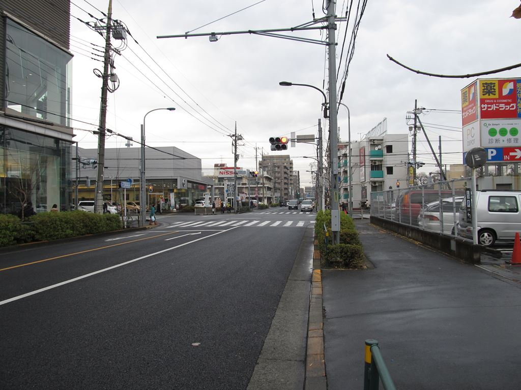 若松町二丁目交差点。甲州街道。新小金井街道。レクサス、サンドラッグ、PCデポ、サミットストア。東京都府中市